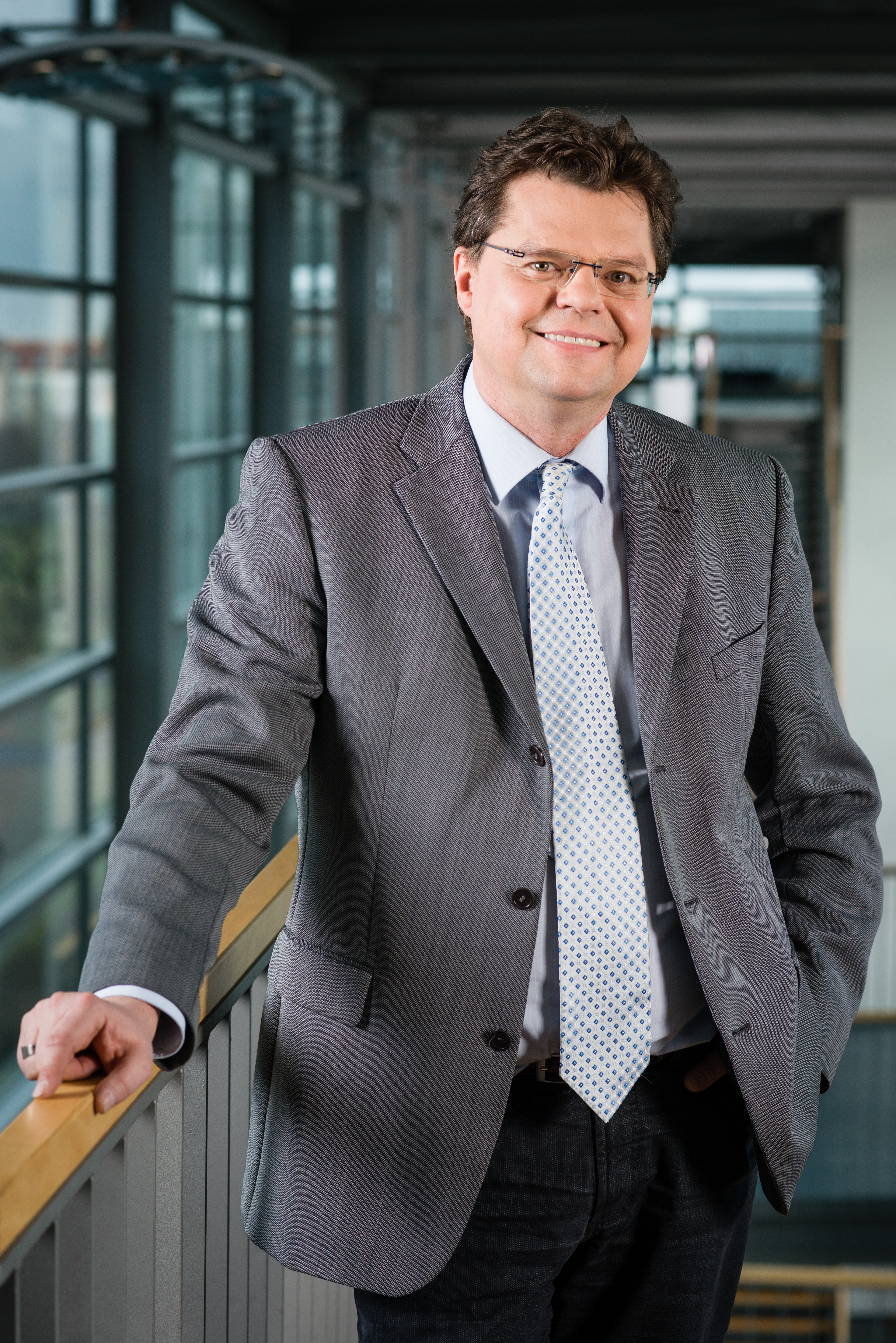 Prof. Dr.-Ing. Udo Reichl, Leiter der Fachgruppe Bioprozesstechnik am Max-Planck-Institut für Dynamik komplexer technischer Systeme / 2014